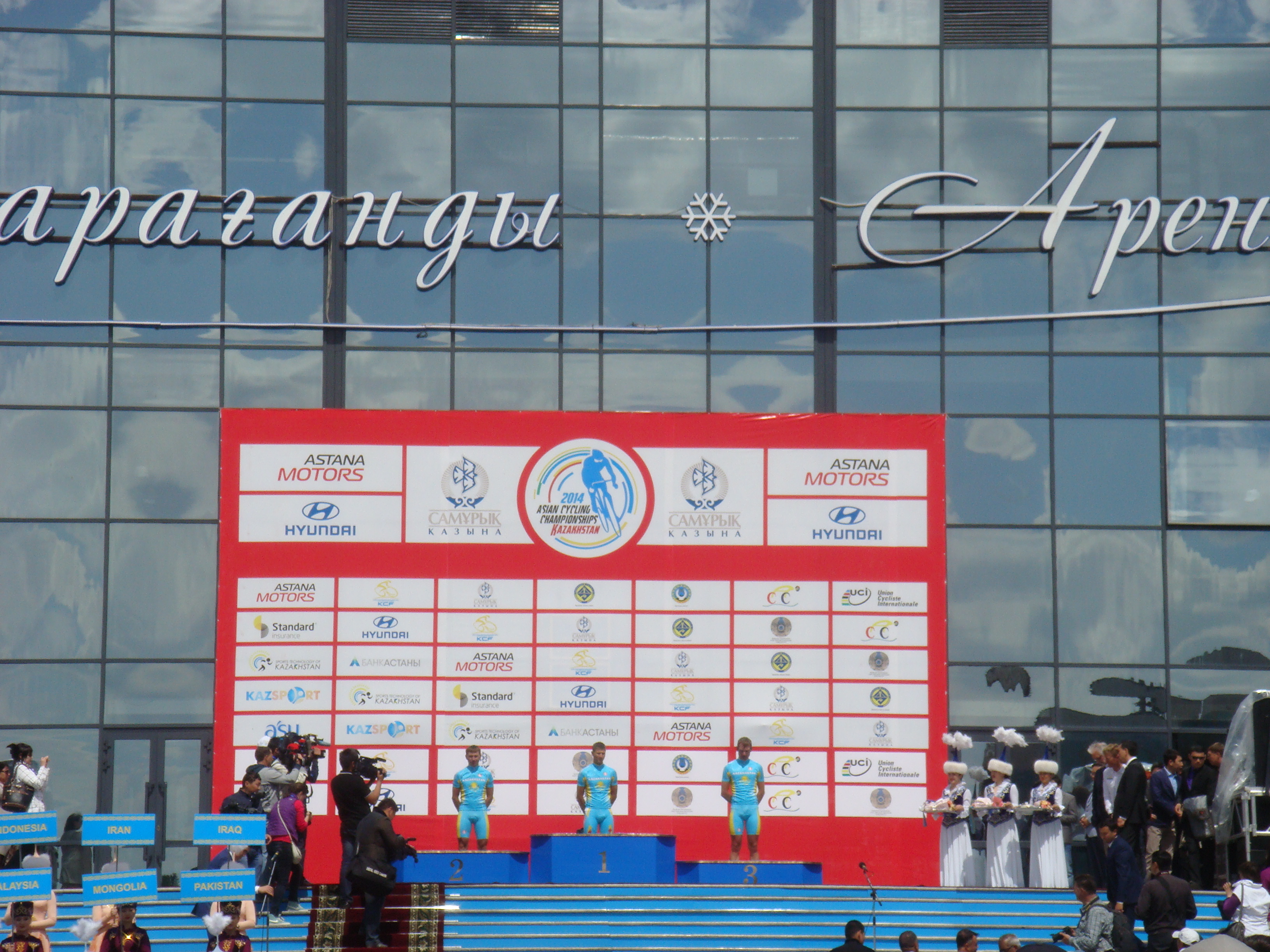 Чемпионат Азии по велоспорту 2014